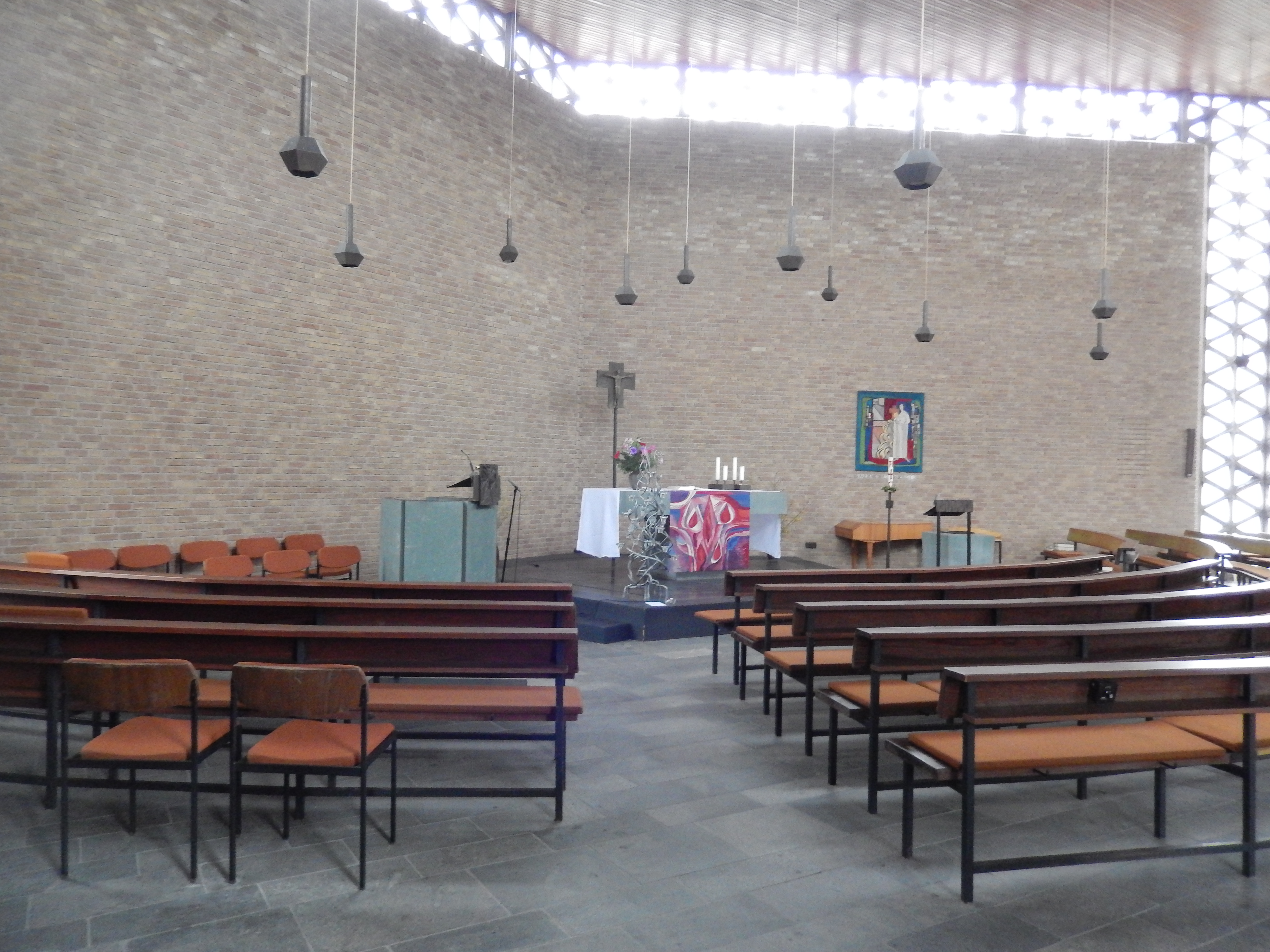 Simeonkirche Hannover, innen